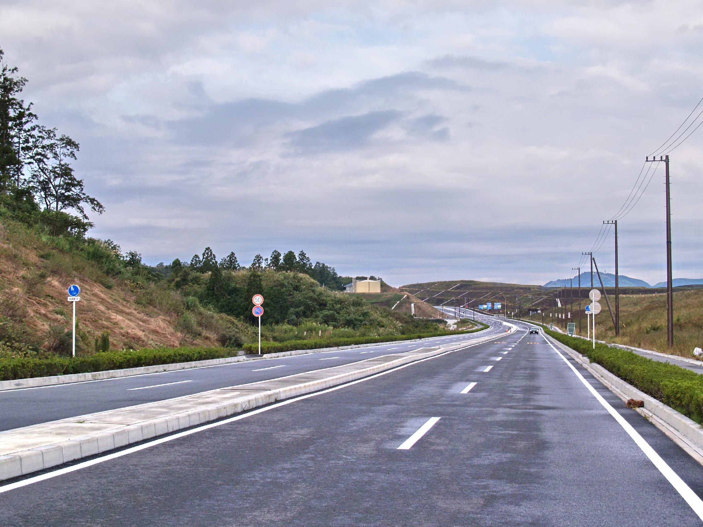 静岡県道408号静岡空港線。静岡空港ターミナルビル側から富士山静岡空港交差点を向いて撮影。